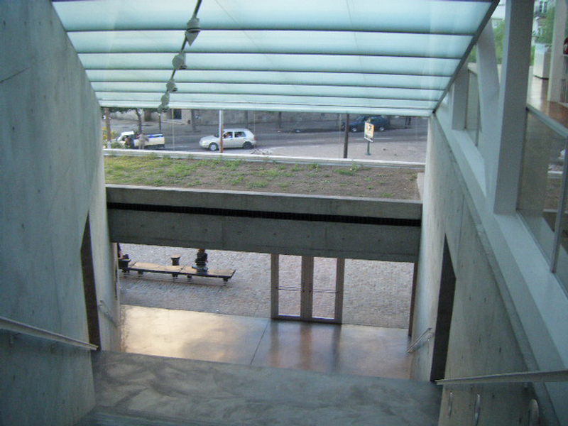 Vestíbulo de ingreso a la parte nueva del Museo Caraffa.